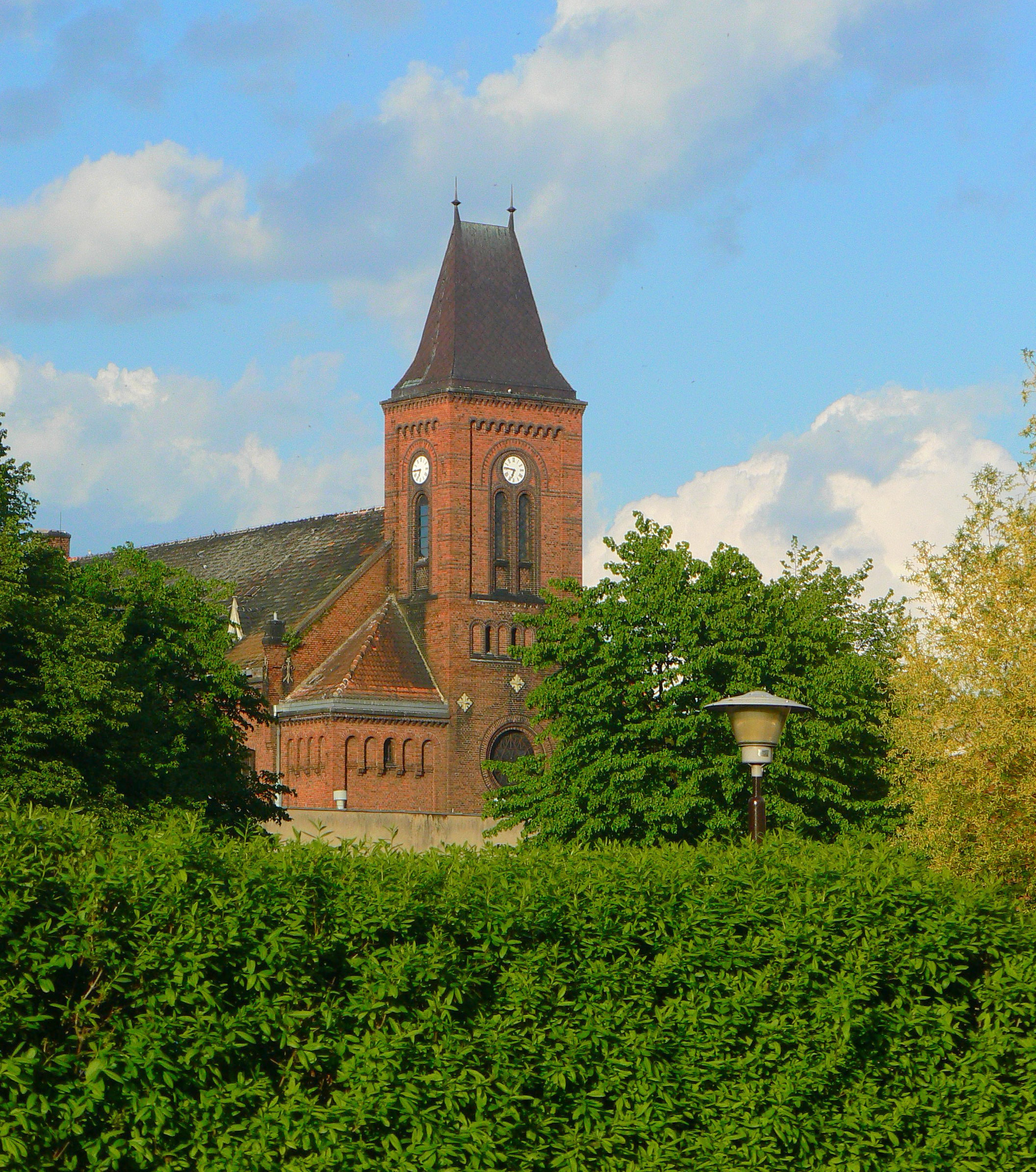 Prison in Wronki